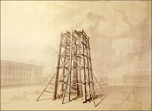 Antonio Adamini, Holzgerüst zur Erstellung des Rumjanzewskj-Obelisken, Sankt Petersburg / Wassilij-Insel, um 1820, aquarellierte Tuschezeichnung, 44.8 x 57.4 cm. - Archivio Adamini.